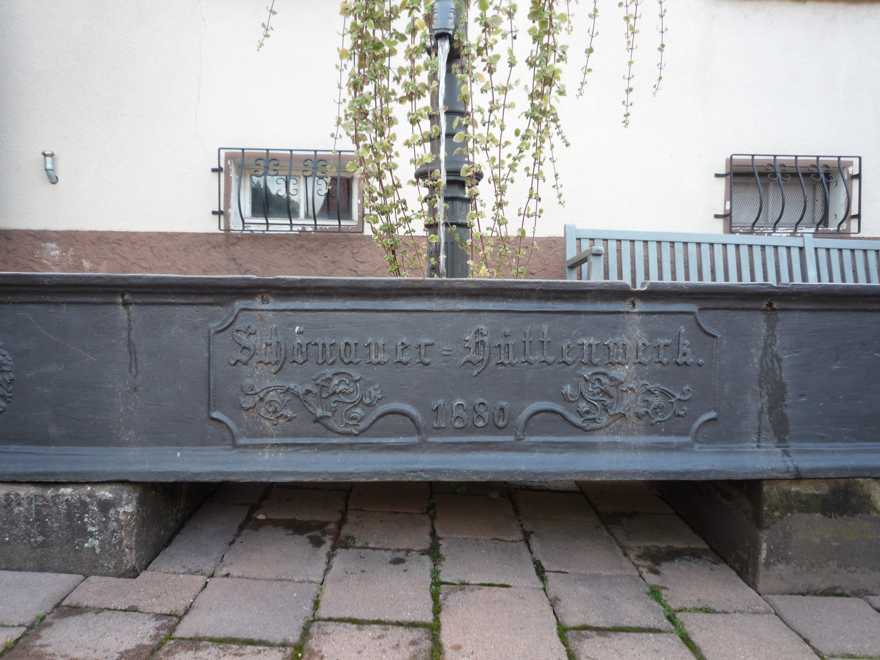 Gusseiserner Brunnentrog in Schönau (Pfalz); Inschrift: Schönauer Hüttenwerk 1880